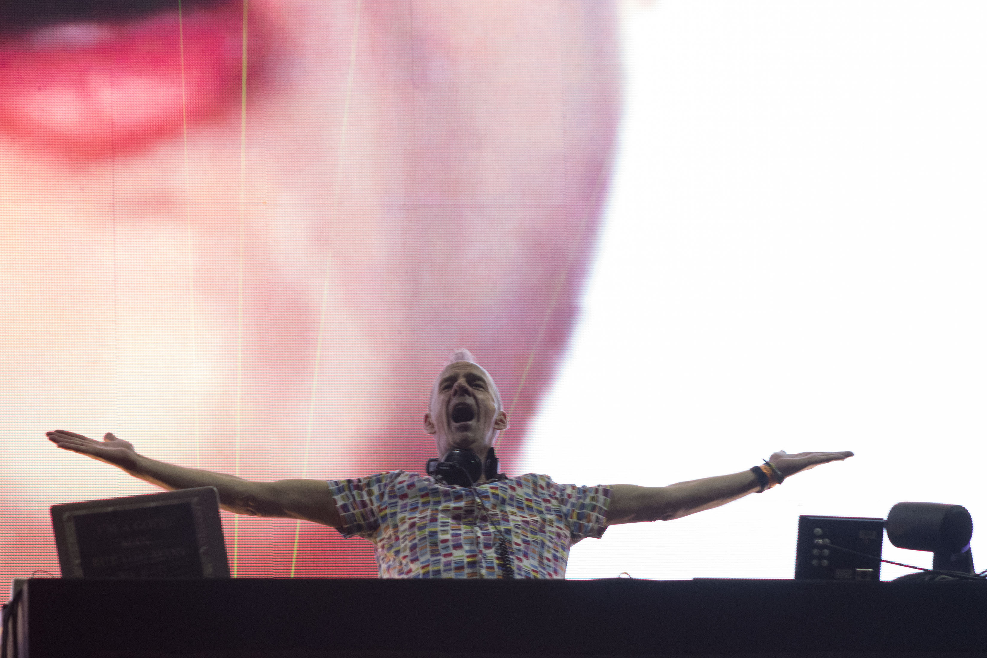 Sábado 12 de noviembre de 2017. Como parte de las actividades de la Semana de las Juventudes del 2017, este sábado 12 de noviembre se desarrolló un segundo concierto masivo en la plancha del Zócalo capitalino. Las bandas que se presentaron en esta ocasión fueron: Marcelo Viejo, Charlie Rodd, Ely Guerra, Dorian, Chetes, La Gusana Ciega, División Minúscula, El Tri y Fatboy Slim. Fotografía: Carlos Luna / Secretaría de Cultura CDMX